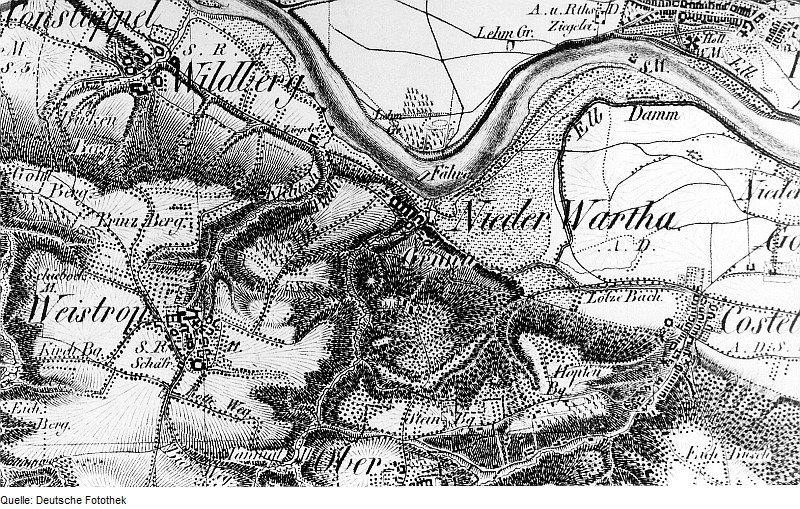 Original image description from the Deutsche Fotothek Dresden-Niederwartha. Oberreit, Sect. Dresden, 1821/22